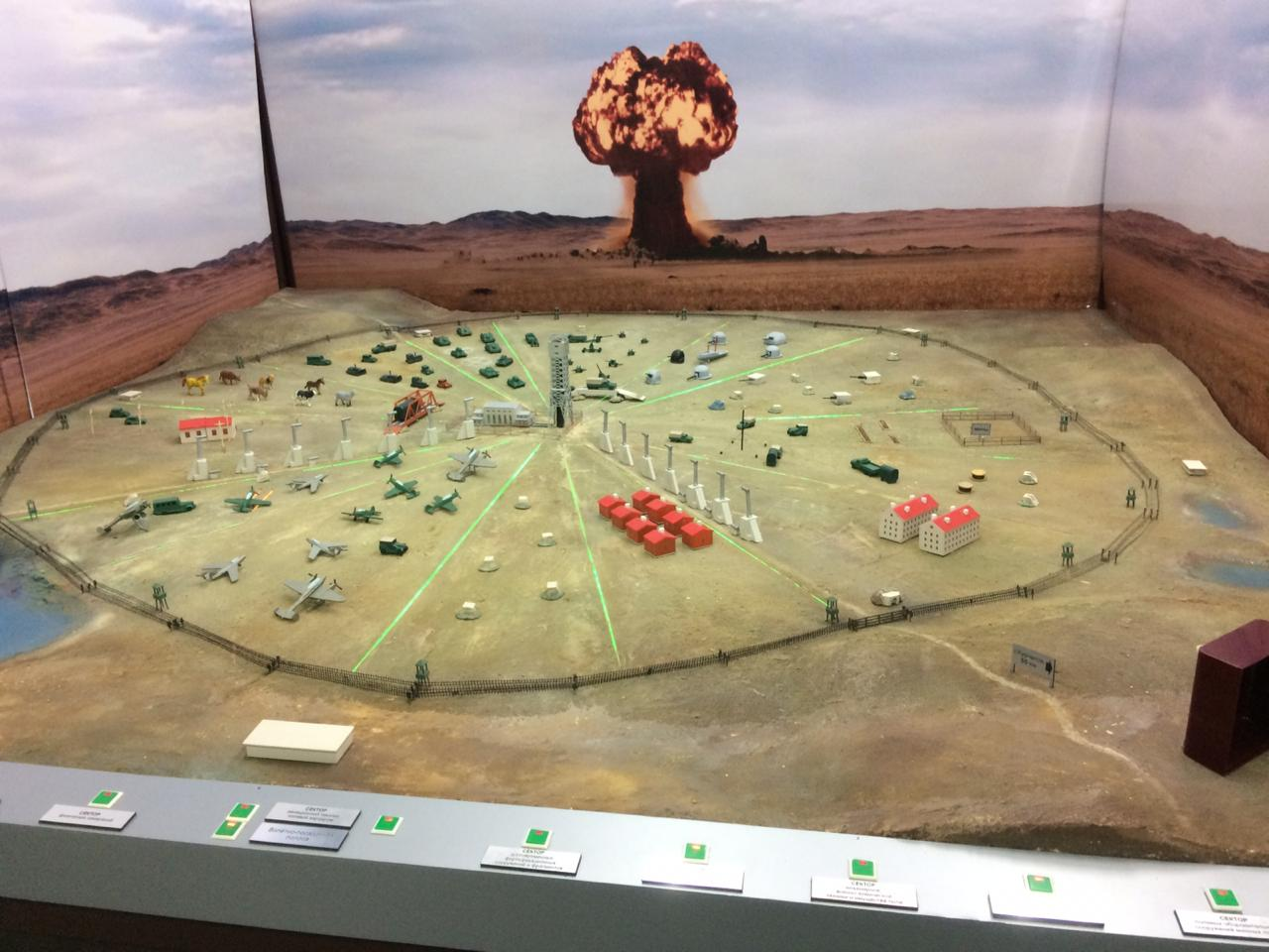 Қазақша (кирил): Жарылысты ұйымдастыру объектілерінің орналасу макеті